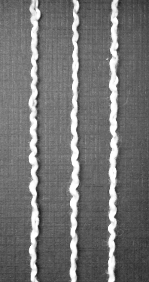 Onde-Garn 435 tex vierfach gezwirnt aus VI/CO/PA